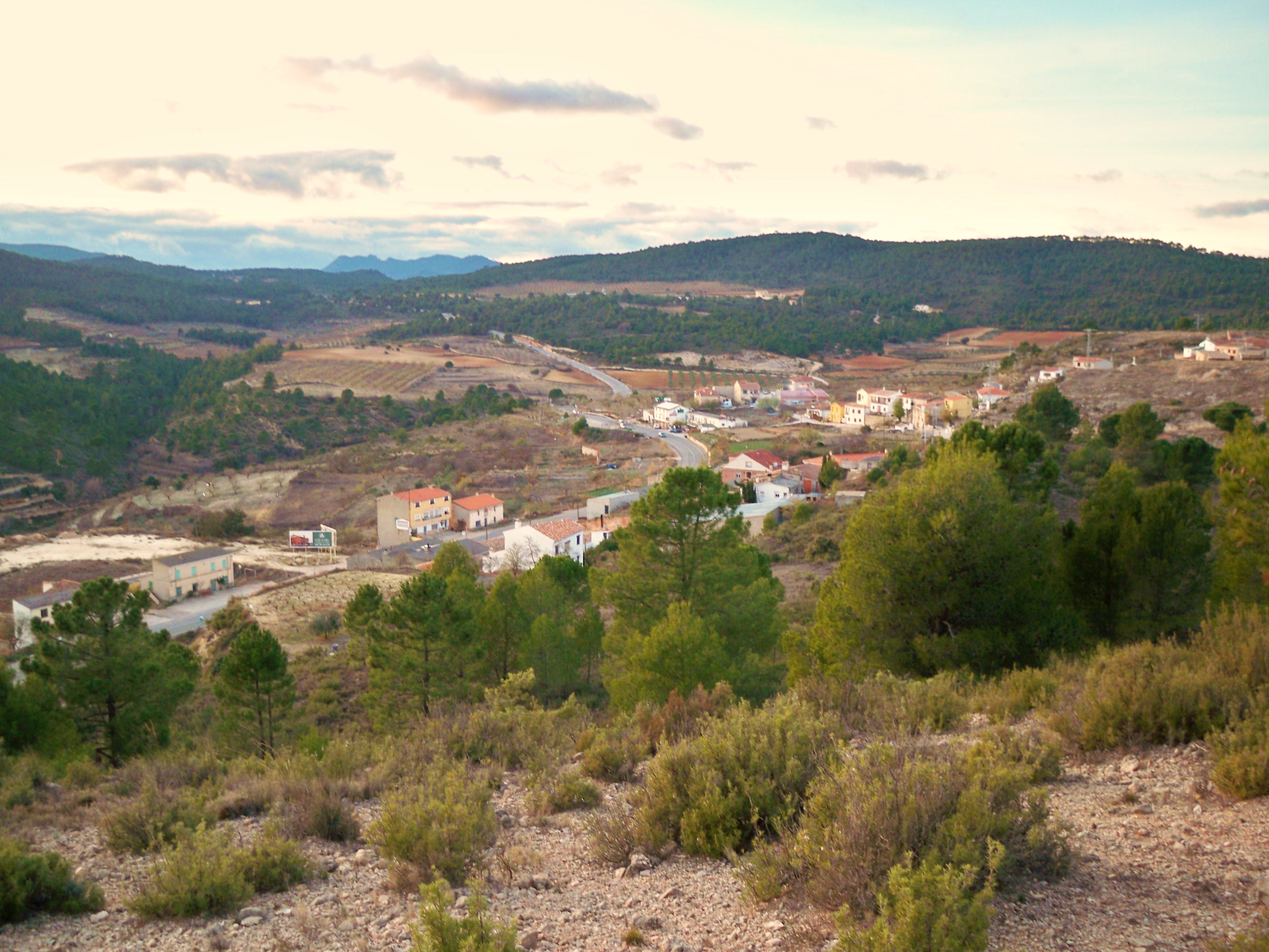 Fotografía panorámica de la aldea de Fuente - Higuera (Molinicos - Albacete)